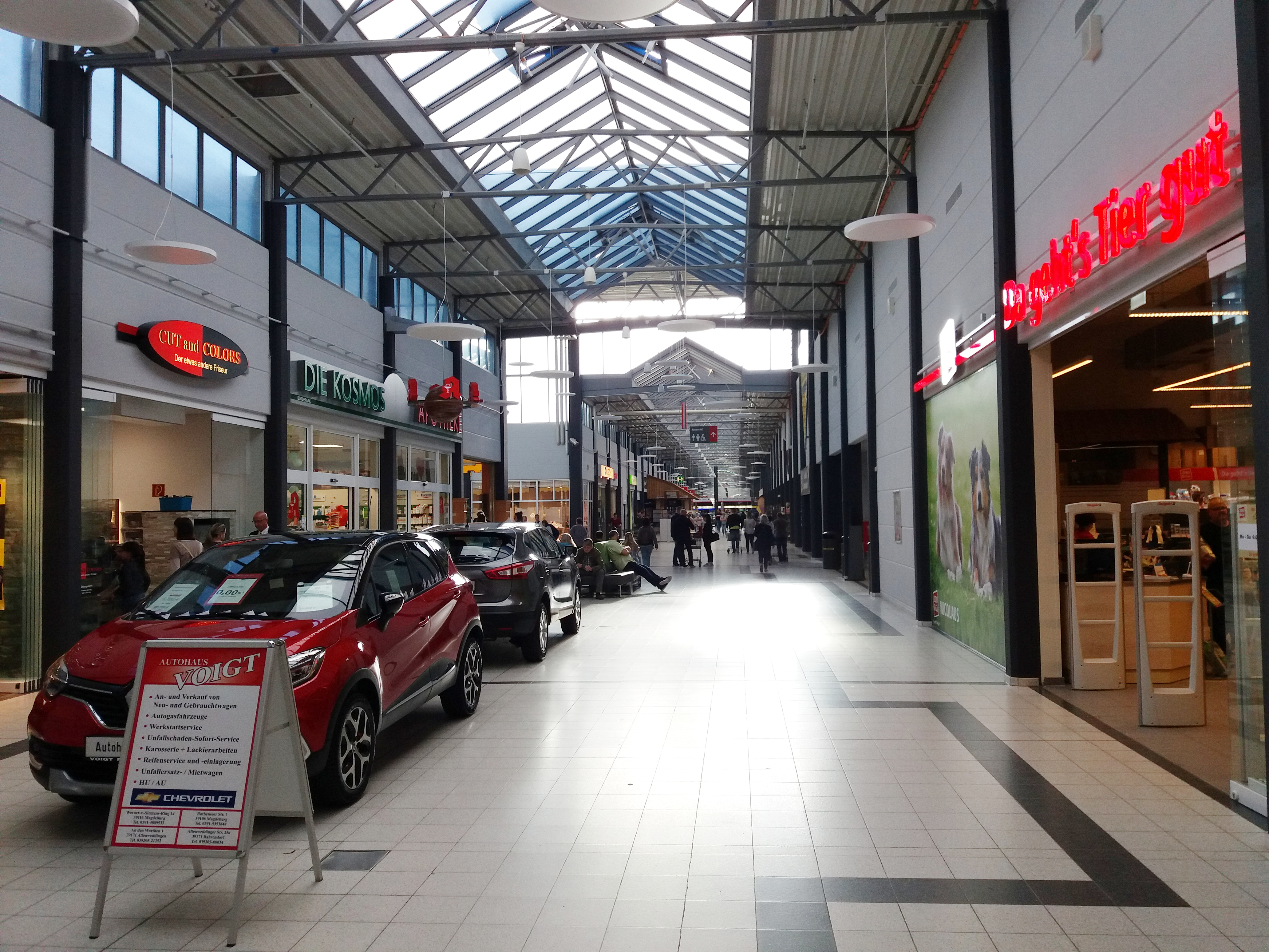 Innenansicht eines Teiles vom Bördepark Einkauszentrum.